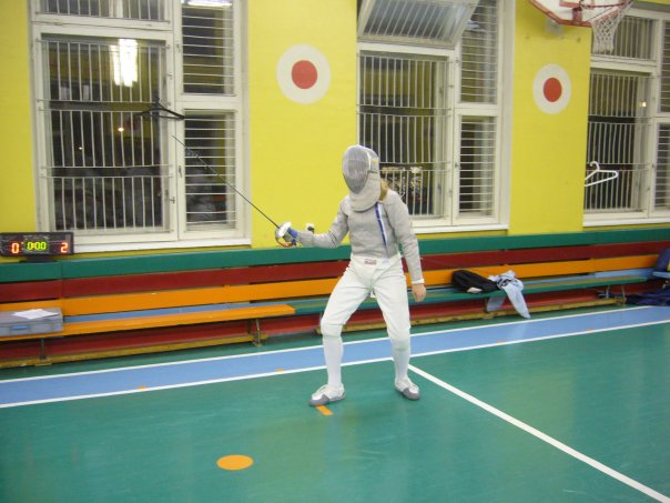 Спортивное фехтование на саблях.